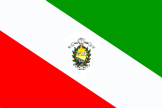 Bandera Municipal de Támara, Casanare